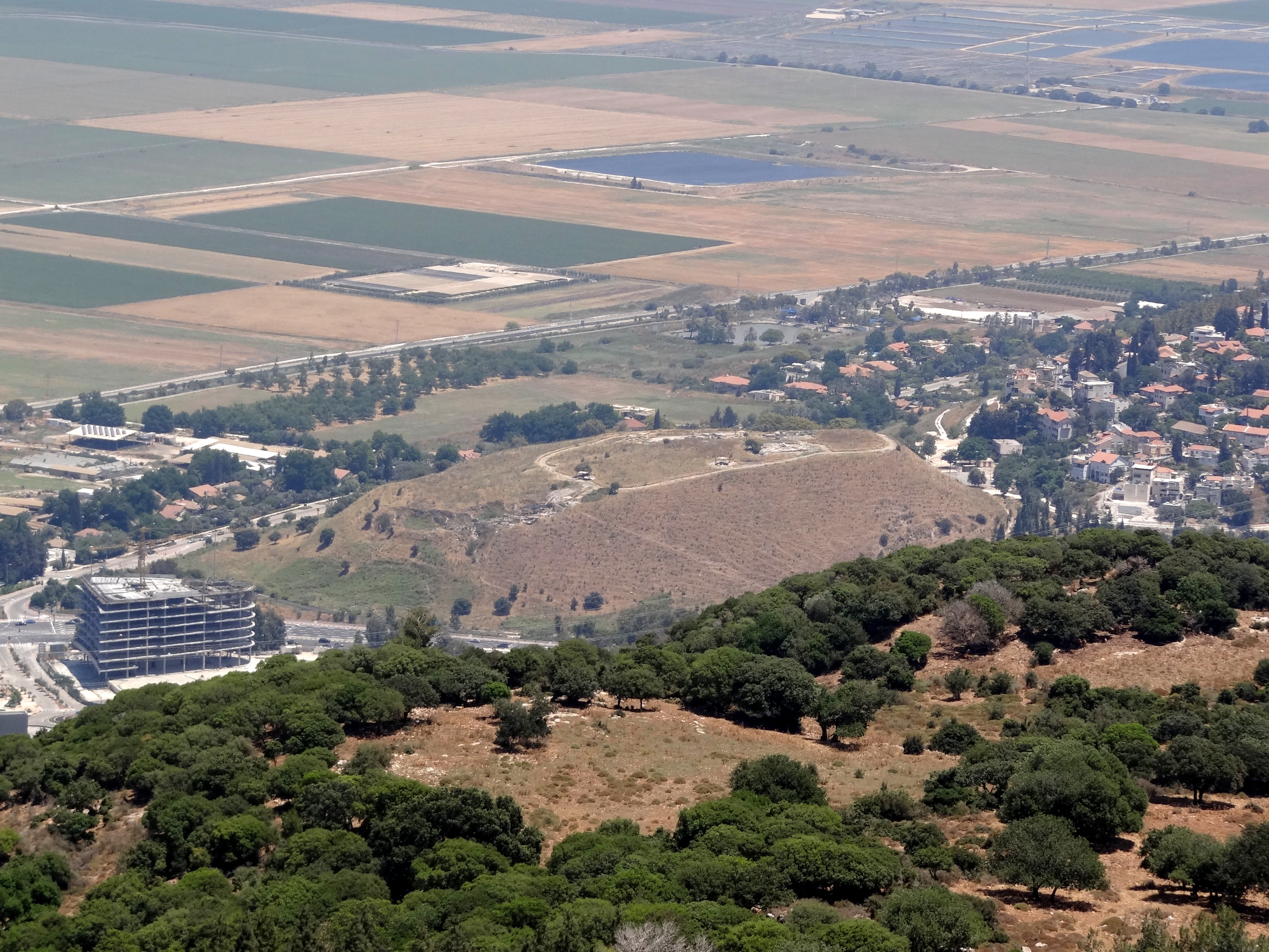 Tel Yokneam, Archaeology site on north of Israel תל יקנעם, אתר ארכאולוגי בכניסה הצפונית לואדי מילק. שוכן ליד יקנעם המושבה ויקנעם עלית